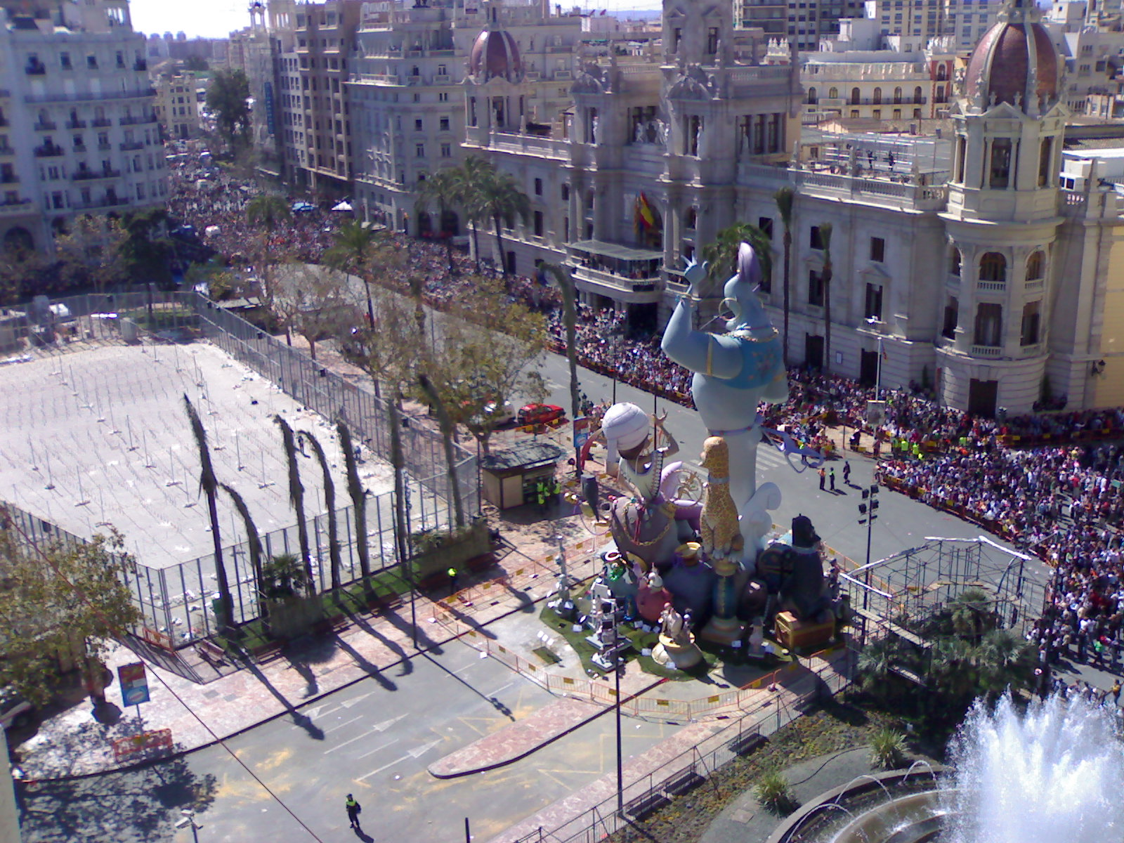 Falla de la Plaza del Ayuntamiento. Momentos previos a la Mascletà. 2008